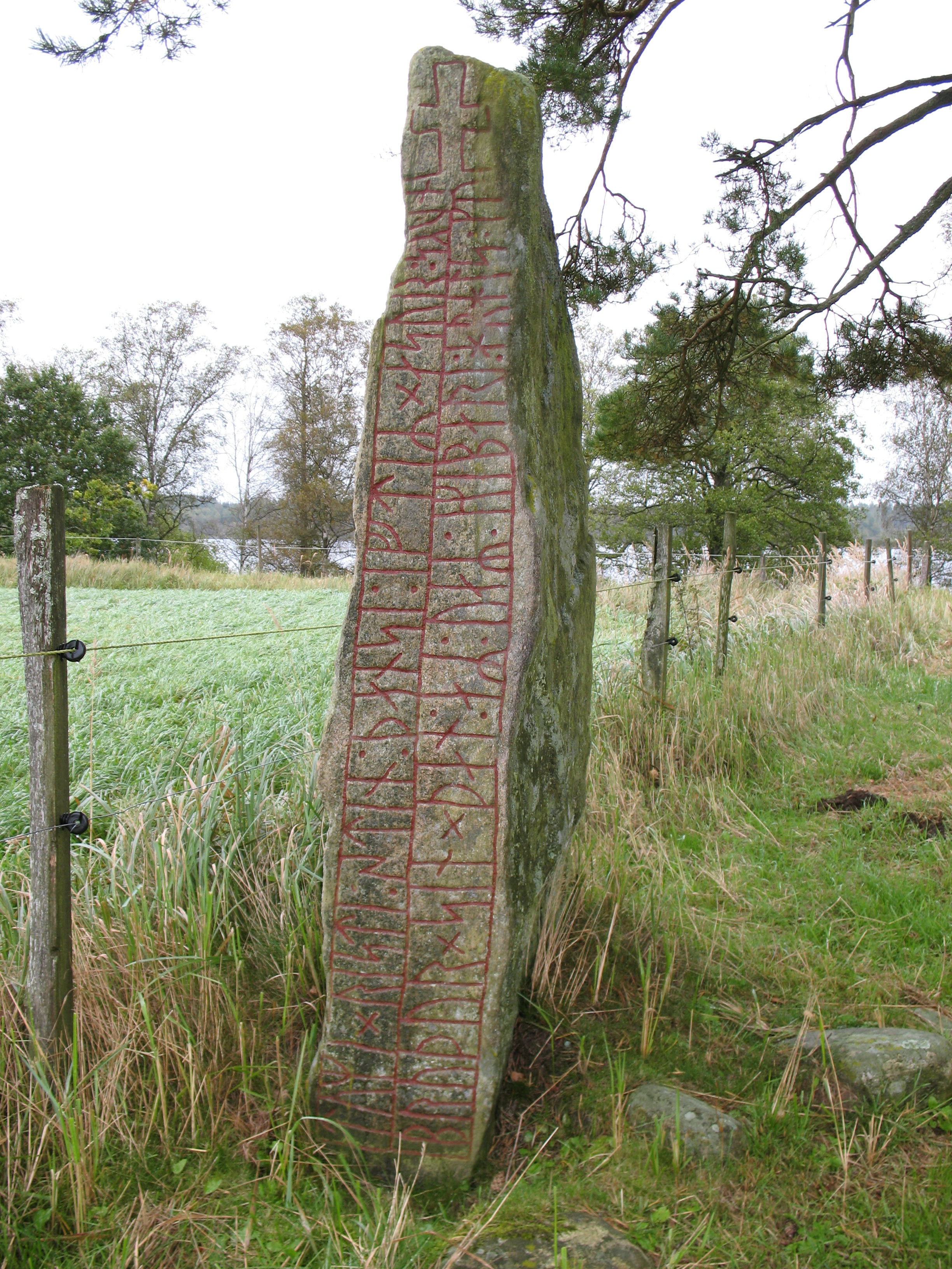 Runstenen Sm 42 i Tuna, Ryssby socken, Ljungby kommun.